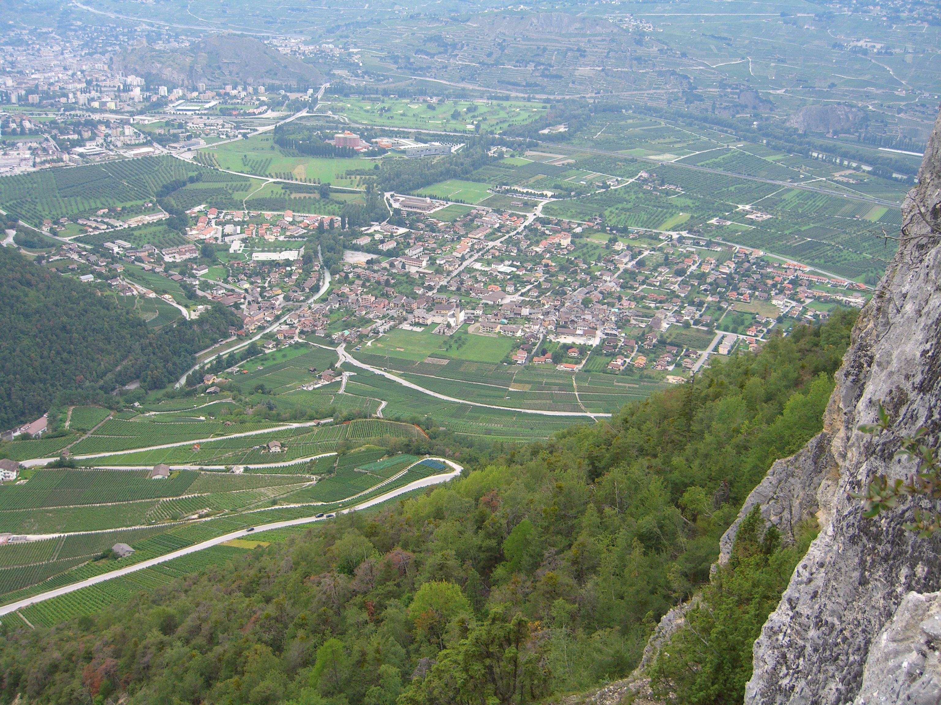 Bramois